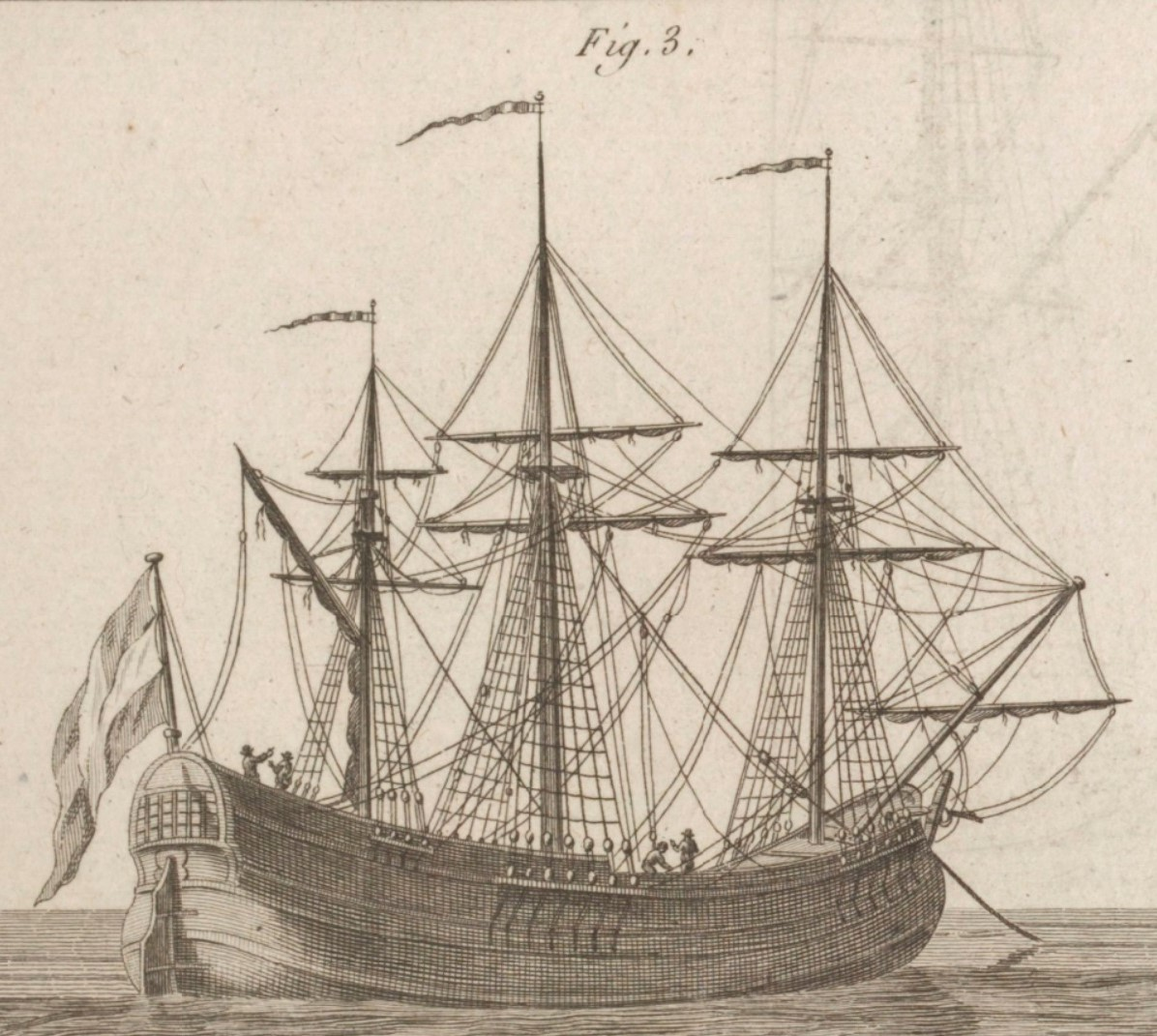 Dessin extrait du Traité pratique du gréement des vaisseaux et autres bâtiments de mer. Tome 2. 1791. Dessin de Lescallier Daniel, gravé par N.F.J. Masquelier.